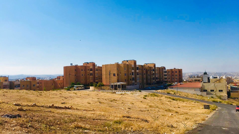 صورة لأحد الأحياء السكنية في منطقة ماركا الشمالية في العاصمة عمان،توضح الصورة طريقة بناء البيوت